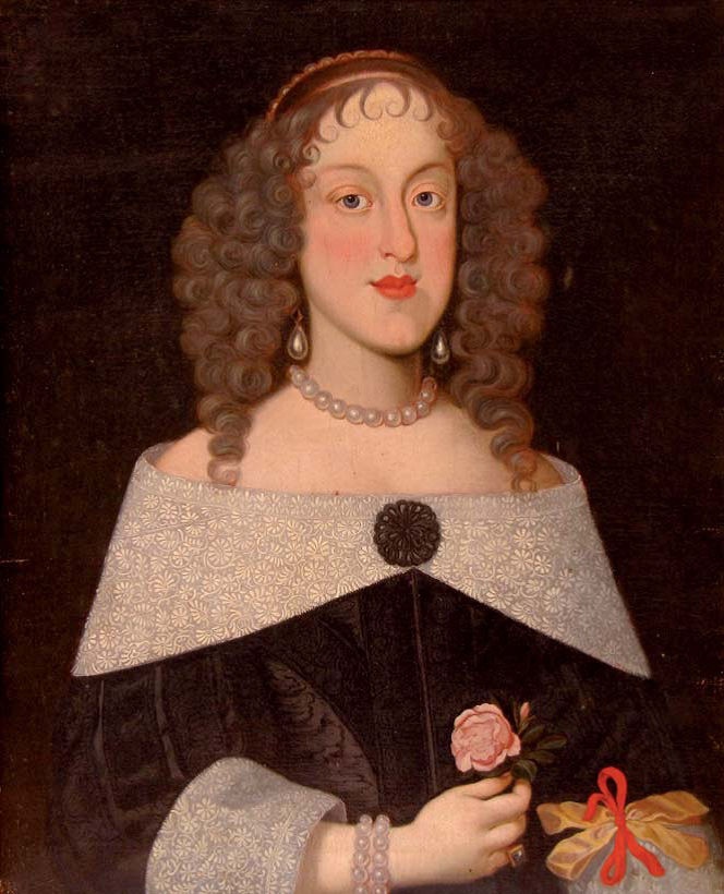 Ritratto di Isabella Clara d’Austria